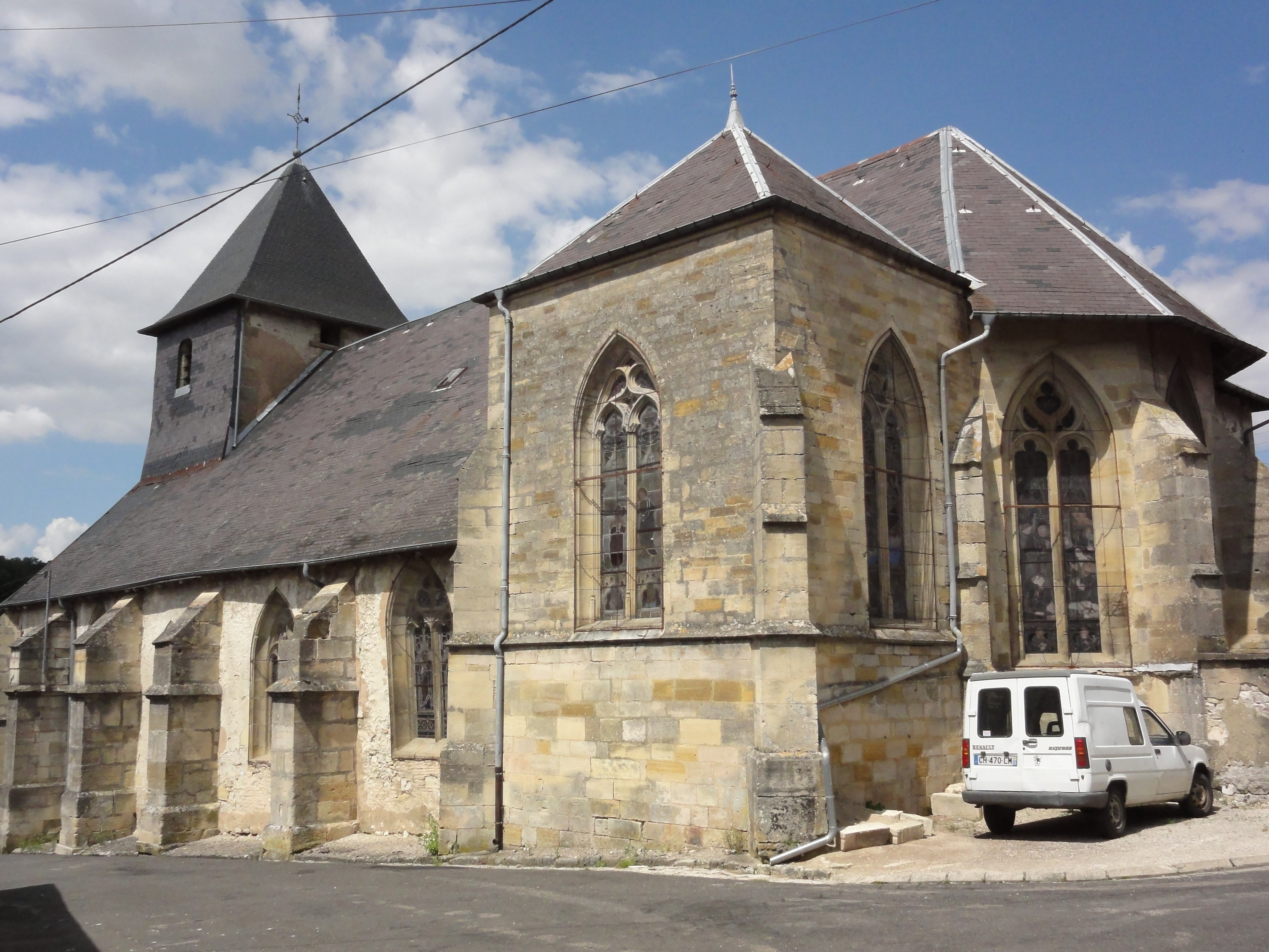 Naives-Rosières (Meuse) Naives, église